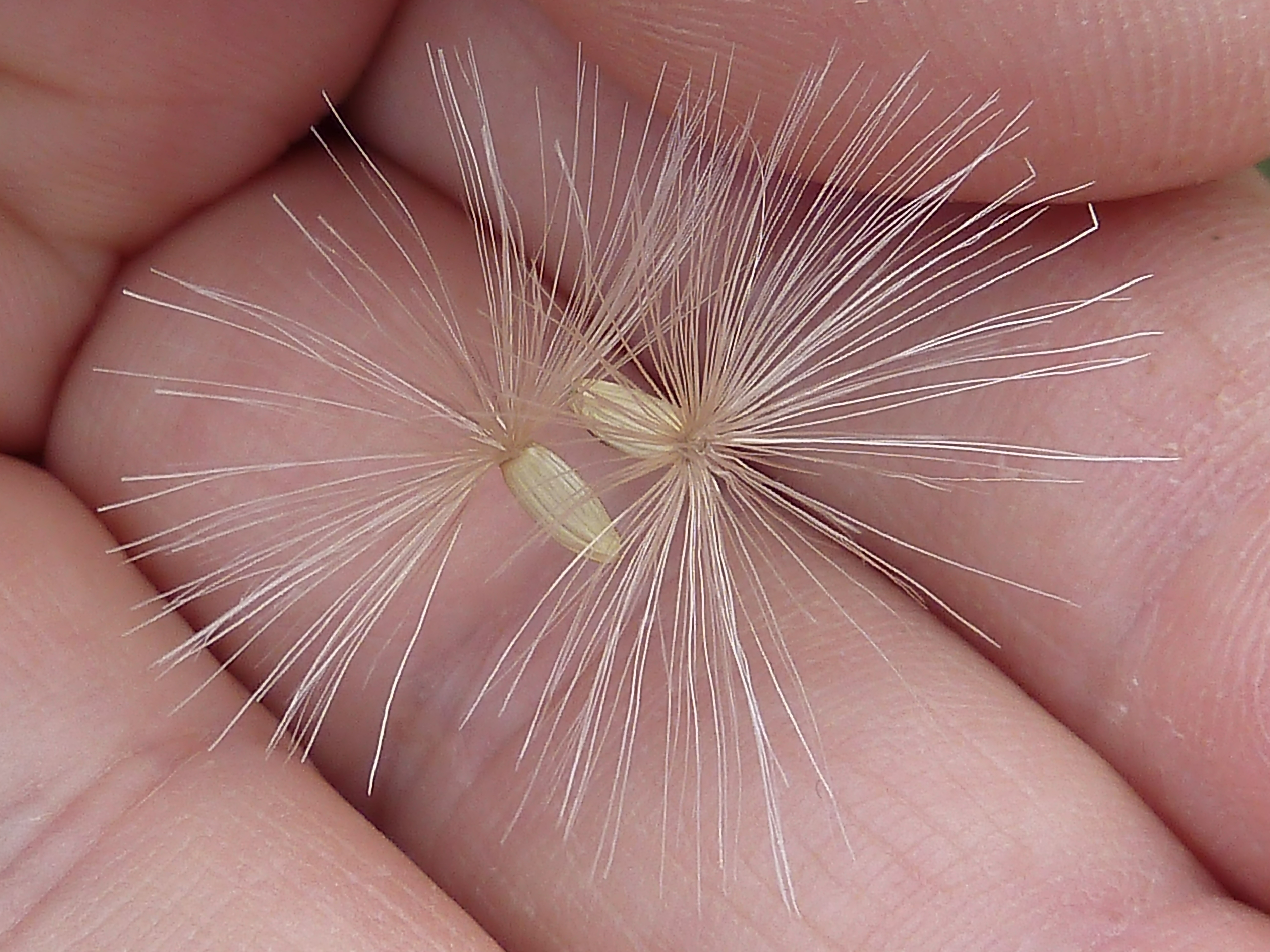 Carduus pycnocephalus : Cipselas sueltas - La Huerta, Albatera (Alicante, España).